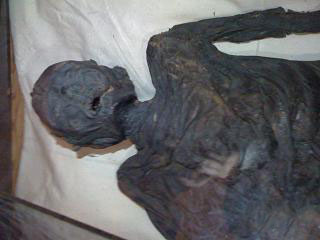 Dronning Gunhild / Haraldskær Kvinden (moselig)